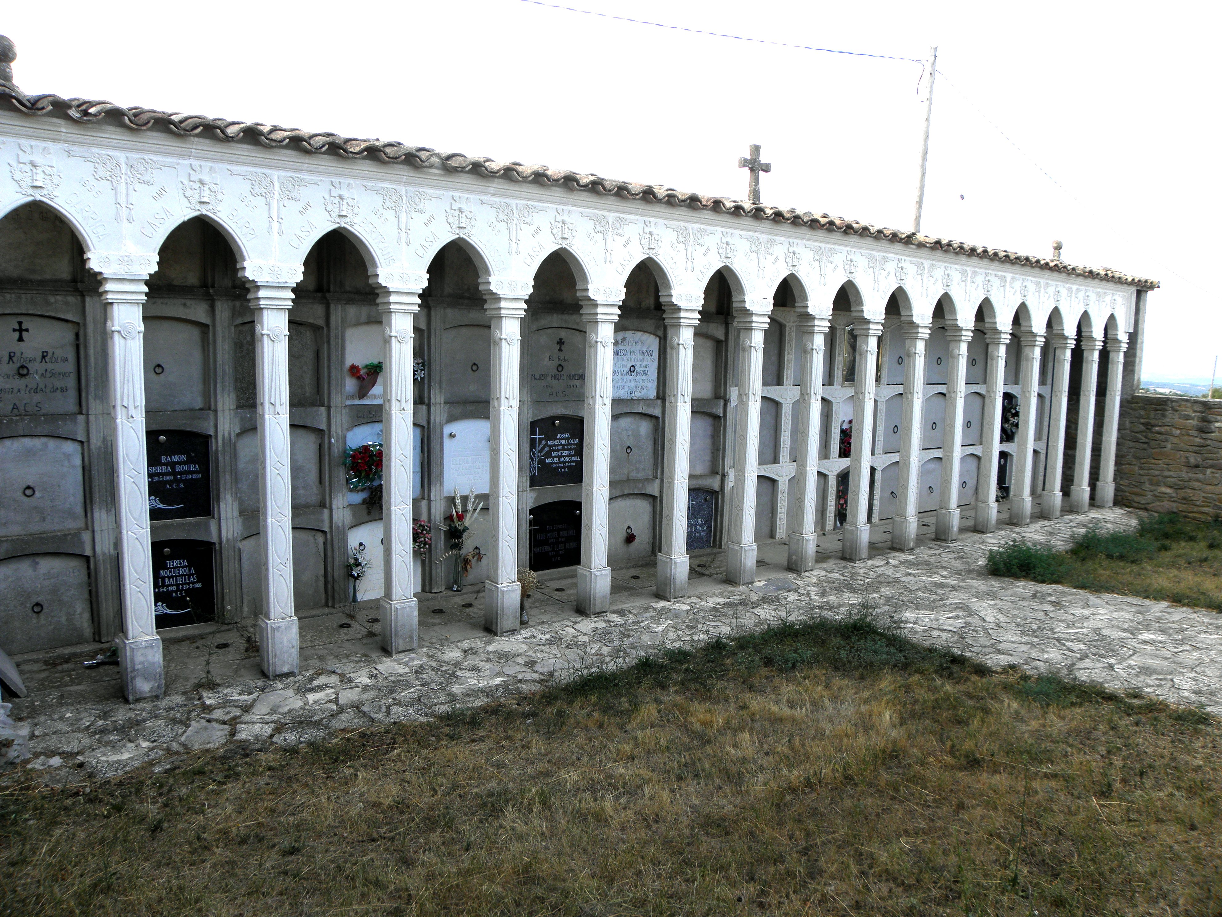 Prades de la Molsosa (La Molsosa, Solsonès)El cementiri nou.